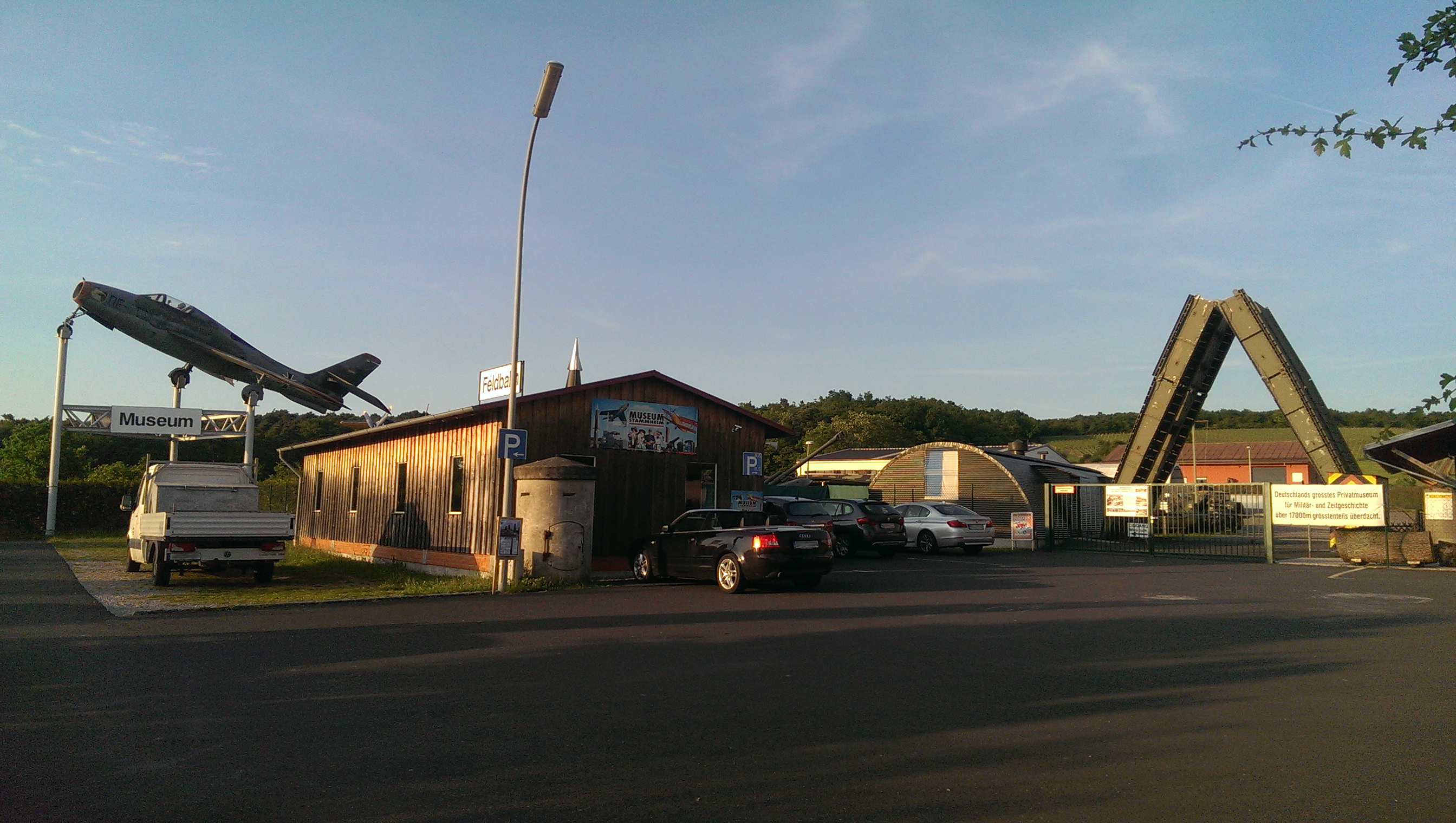 Bild des Eingangs des Museums für Militär- und Zeitgeschichte in Stammheim am Main.